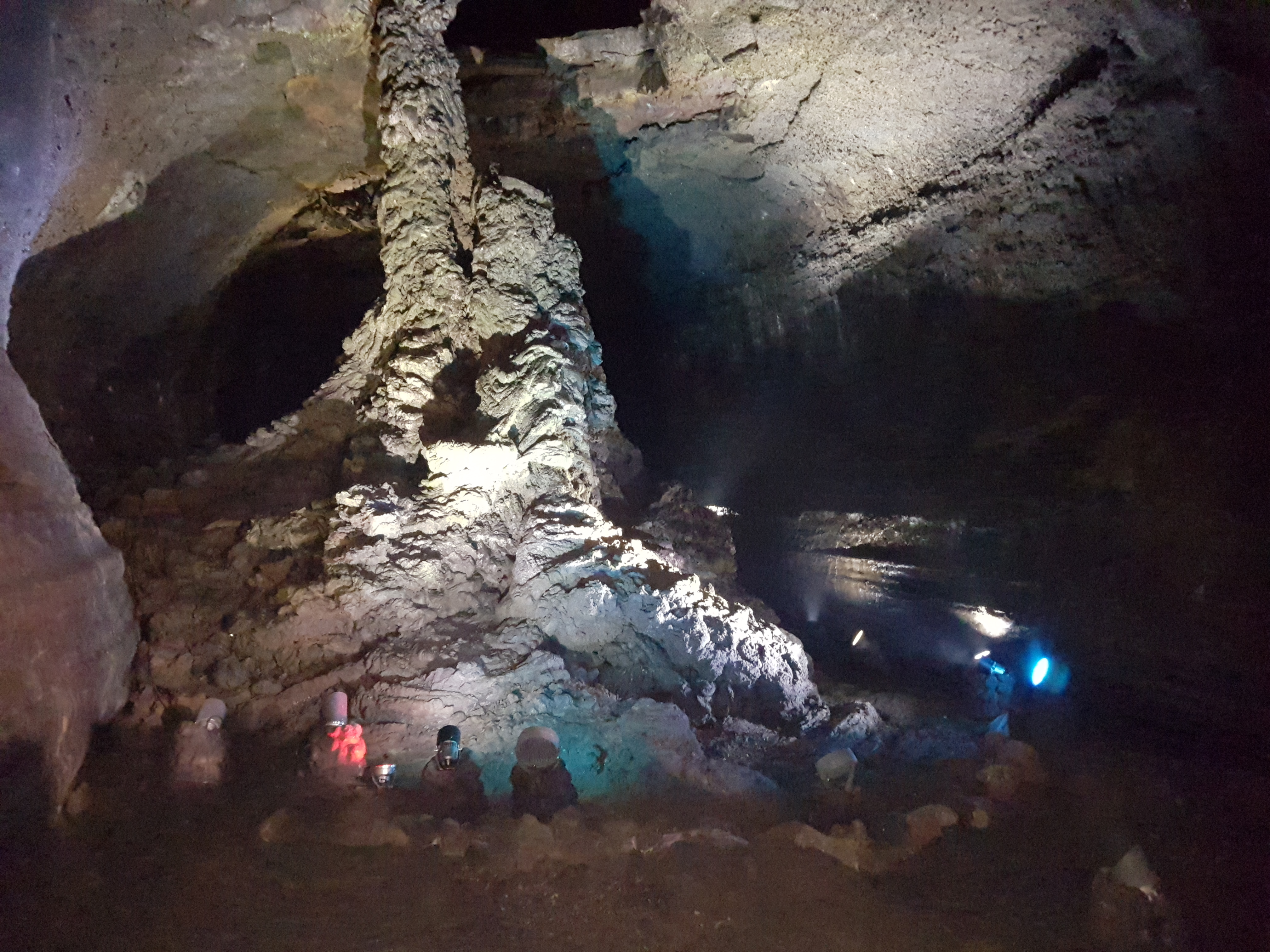 이사진은 제주도에 있는 용암동굴인 만장굴이다 용암이 흐르는것으로 추정되는 구멍을 찍었다